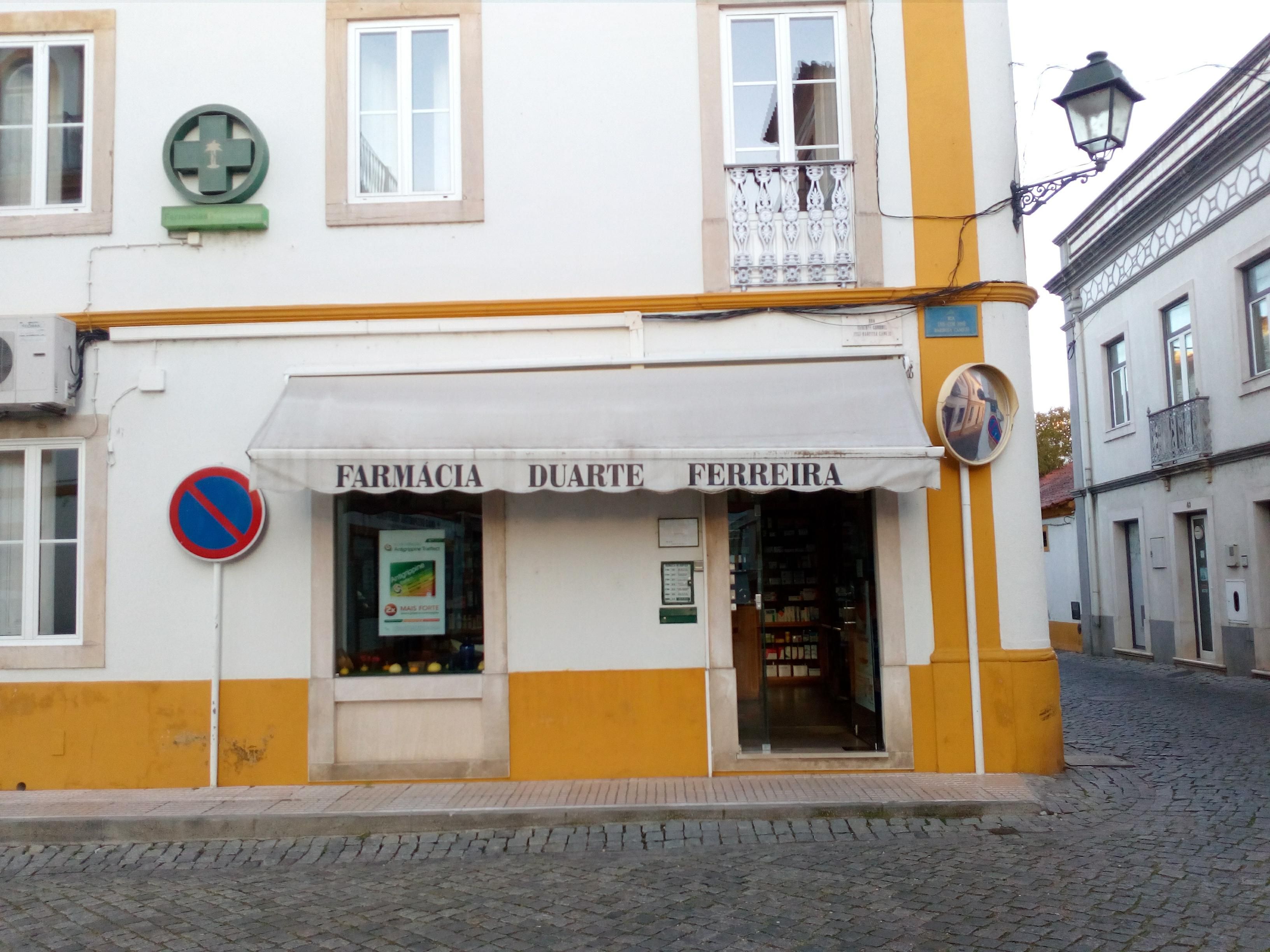 Farmácia Duarte Ferreira, Rua Tenente-Coronel José Barbosa Camejo 13 Rossio ao Sul do Tejo 2205-054 ABRANTES ( São Miguel do Rio Torto e Rossio ao Sul do Tejo )